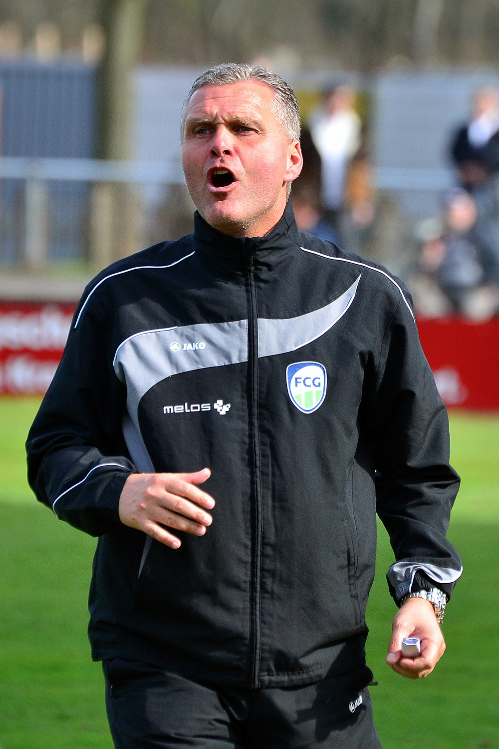 Fußballspiel Hammer SpVg - FC Gütersloh, EVORA Arena, Hamm, Datum/Uhrzeit: 14.04.2013 16:26:42